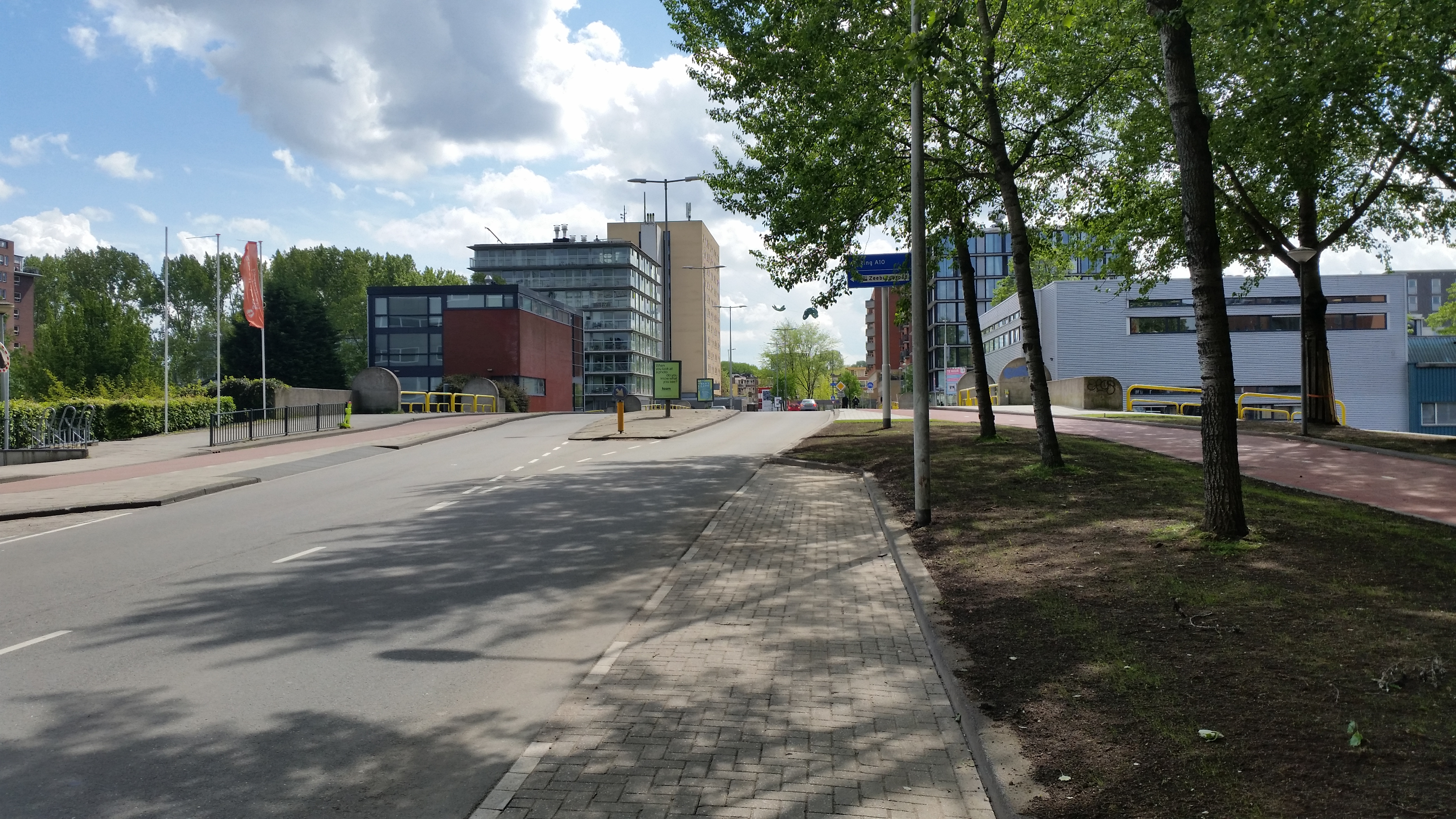 Impressie van de Ad Grimmonbrug brug 1915) in Amsterdam-Centrum (april 2020)